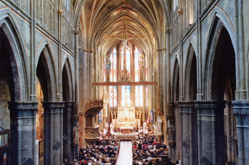 Interieur Basiliek van het Heilig Sacrament in Meerssen (1988)